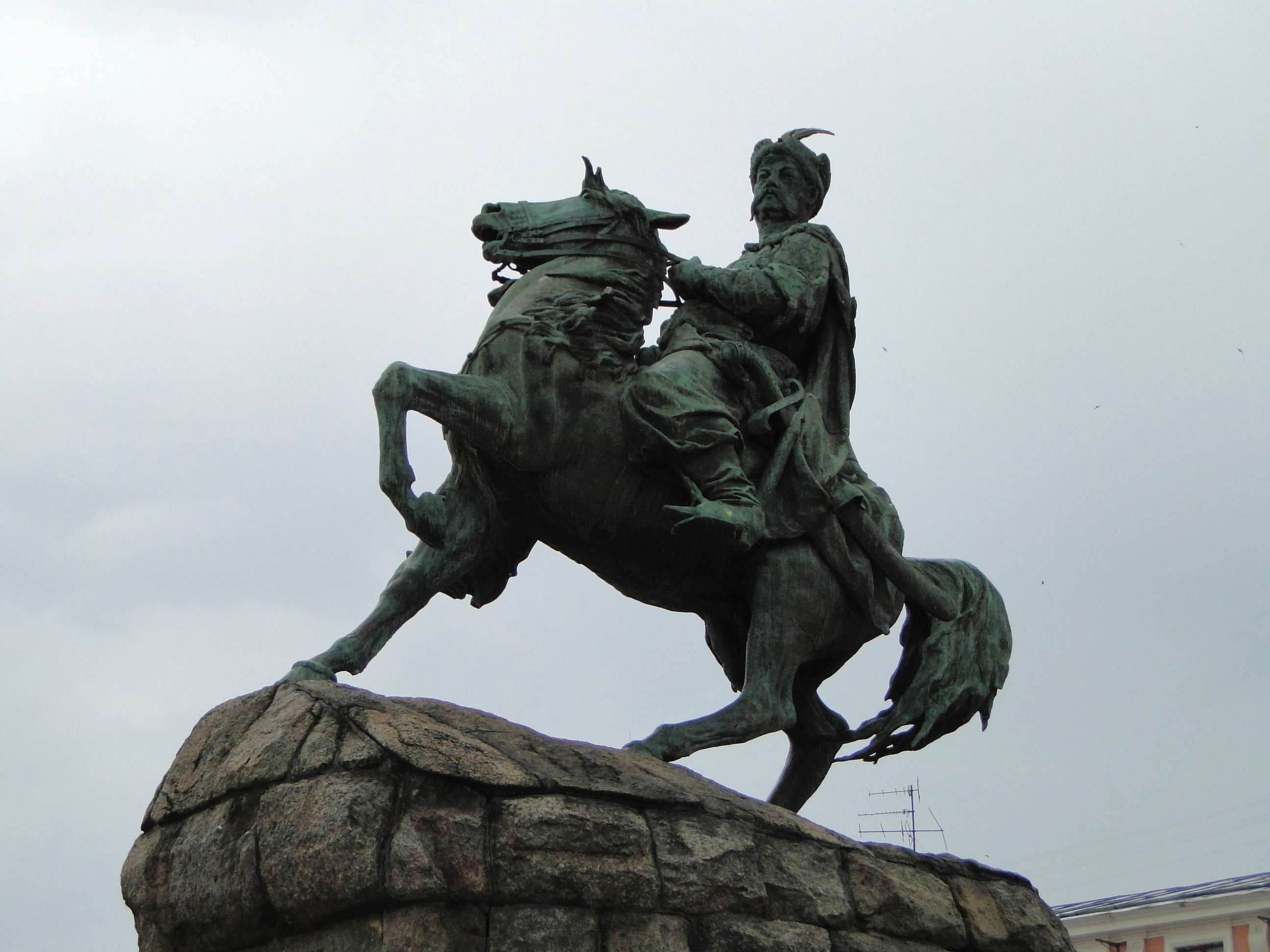 Памятник Богдану Хмельницкому